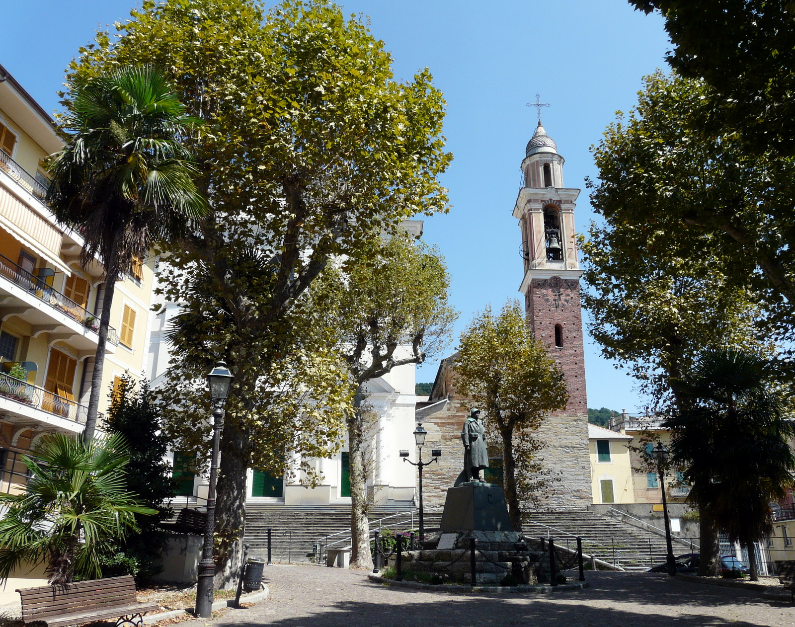 Scorcio del piazzale antistante le due chiese di Sant'Ambrogio e il monumento ai caduti, Uscio, Liguria, Italia